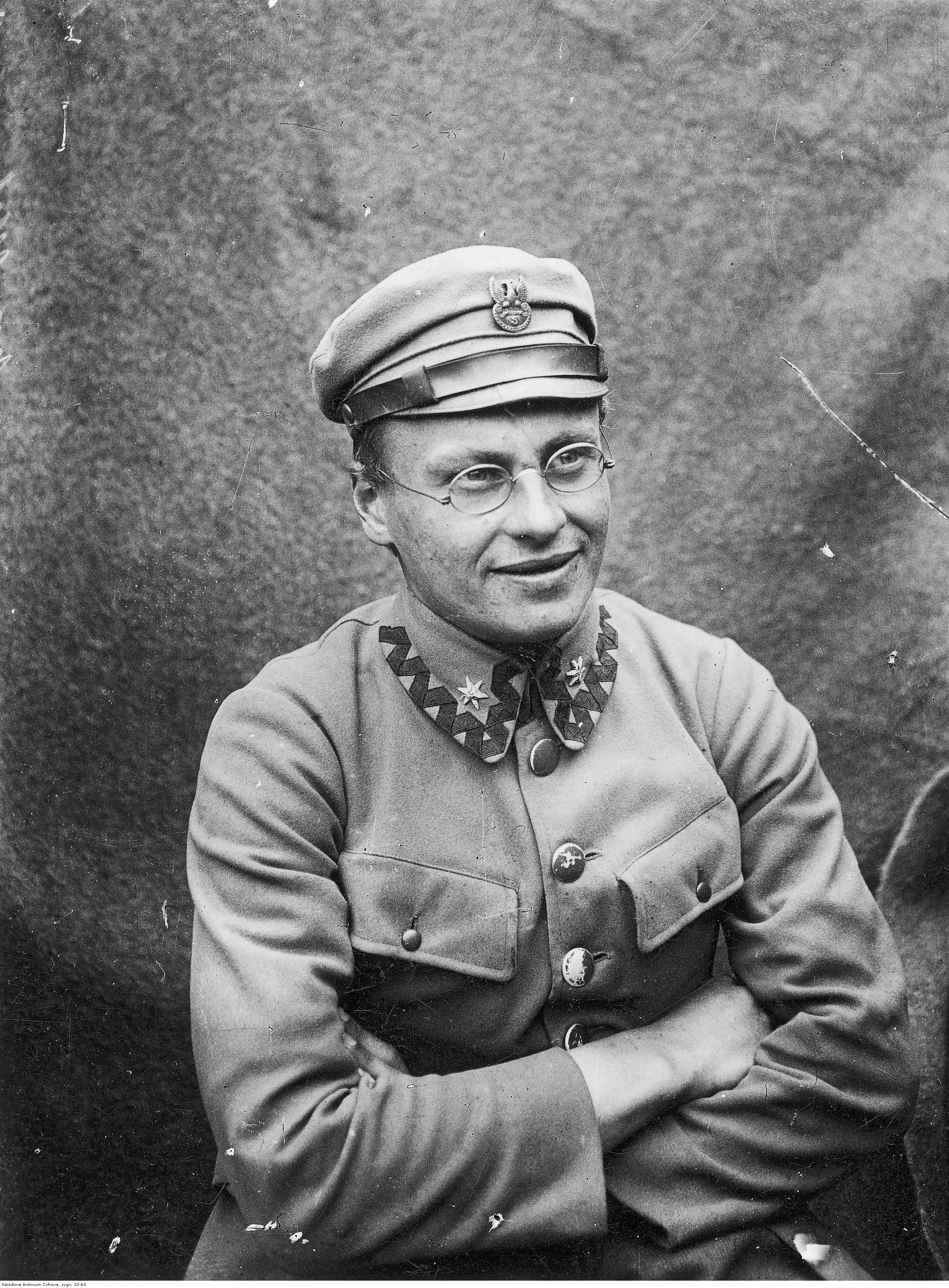 Aleksy Nehring, podporucznik - fotografia portretowa.